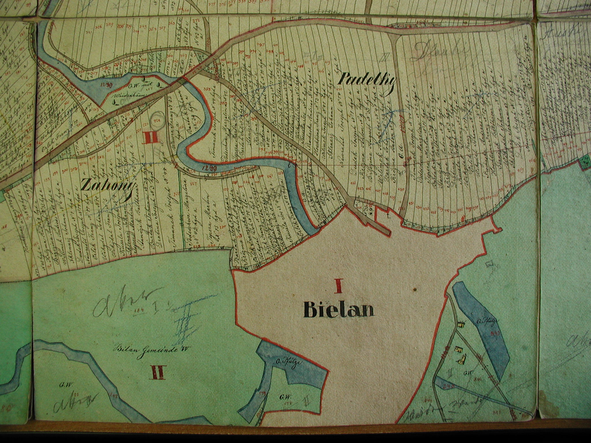 Výřez mapy extravilánu obce.